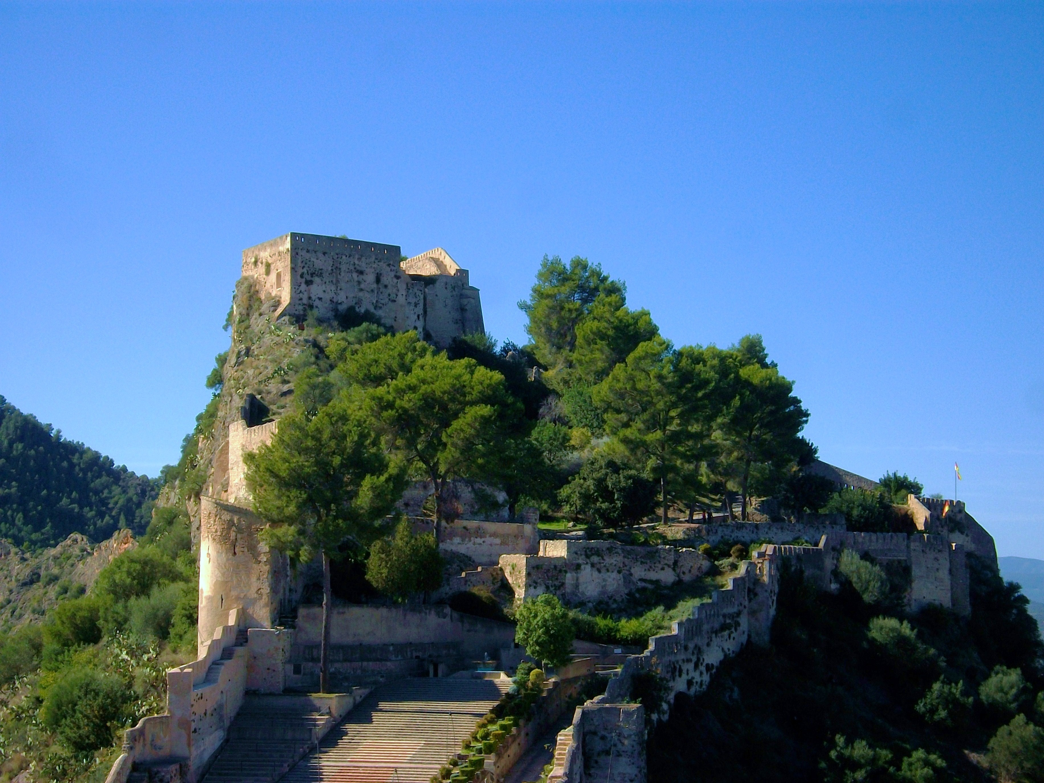 Castell de Xàtiva, concretament el castell major.